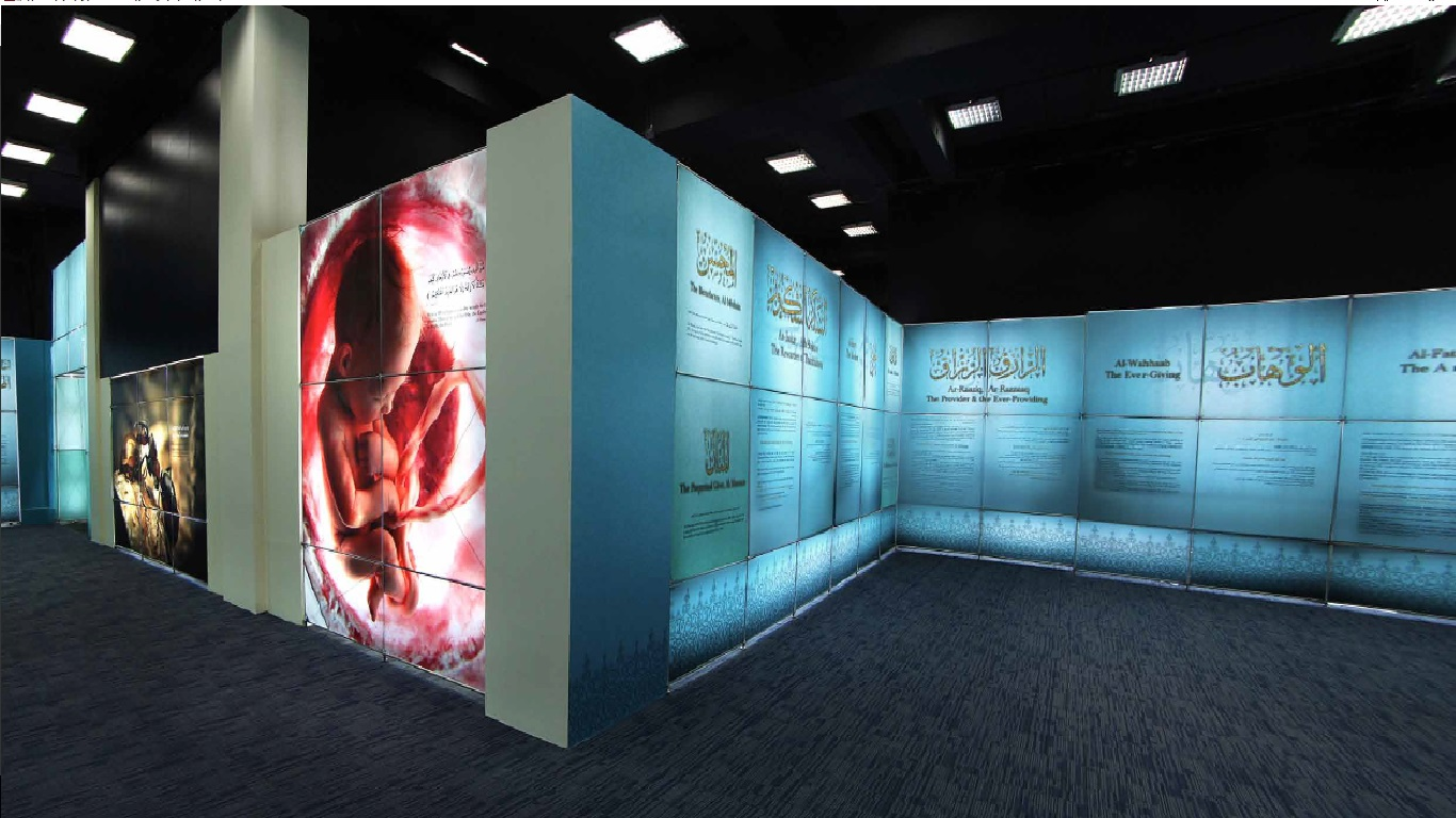 قاعة المحبة والحياء من الله في معرض أسماء الله الحسنى بالمدينة المنورة